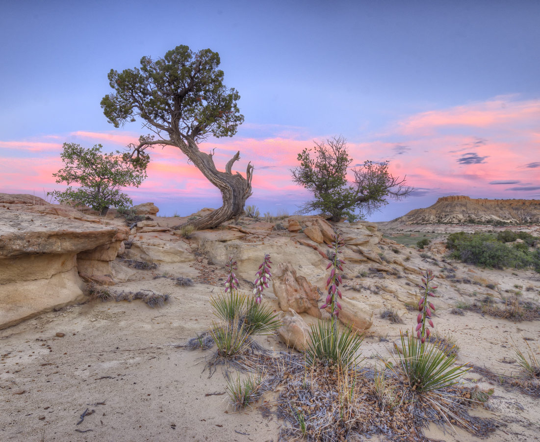 Sunset in Ojito Wilderness, NM